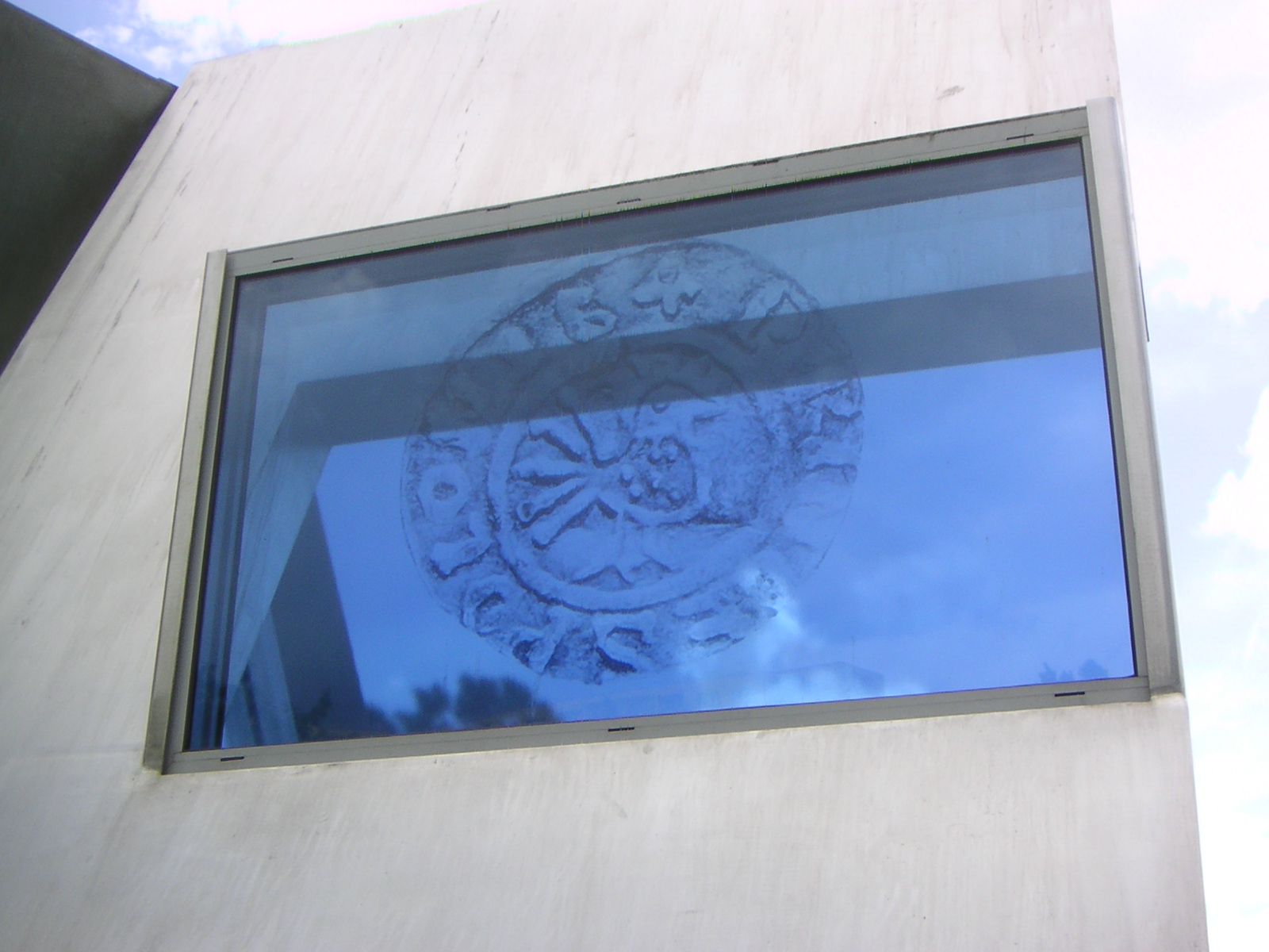 Szczecin-Słoneczne, Pomnik Niepodległości, "witraż" z denarem Bolesława Chrobrego